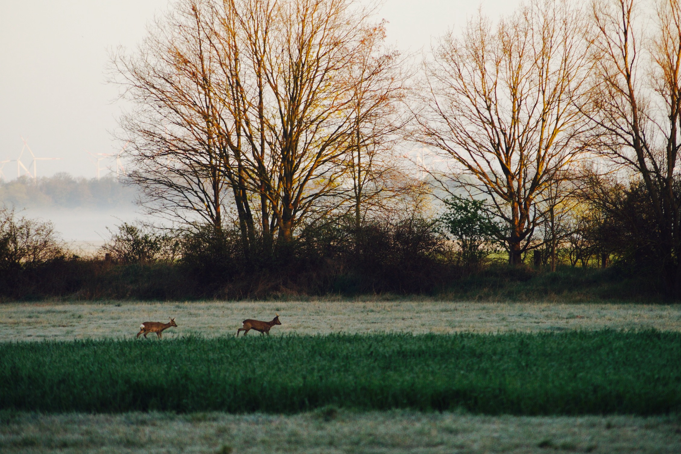 Das Bild zeigt 2 Rehe, die ich morgens beobachten konnte. Aufgenommen in der Naturlandschaft Döberitzer Heide, Potsdam/Fahrland.